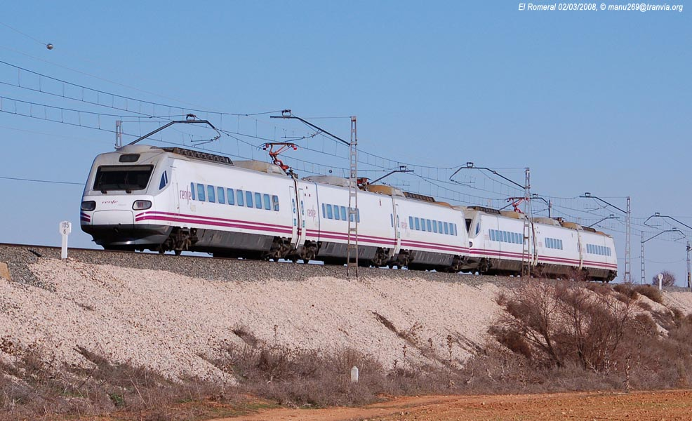 El Romeral: Electromotor 490 en doble composición con el servicio Alaris 1454, entre Madrid Puerta de Atocha y Valencia.